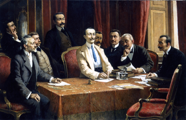 I fondatori della FIATlabel QS:Lit,"I fondatori della FIAT"